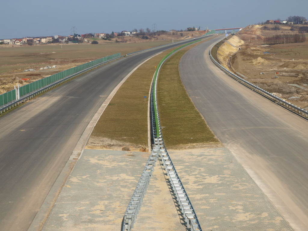 Der Bau der polnischen Autobahn A1 auf dem Abschnitt Piekary Slaskie-Pyrzowice in Richtung Pyrzowice im März 2012.